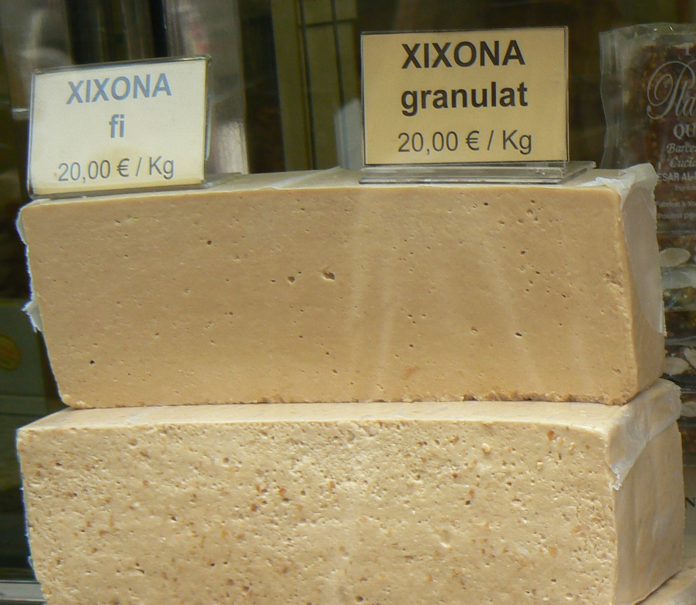 Torrons de Xixona d'una torroneria artesana. A Barcelona, en aquestes torroneries els solen vendre amb dues textures a escollir; "granulat", amb petits trossos d'ametlla, o "fi", a la qual no es noten gens els trossos.